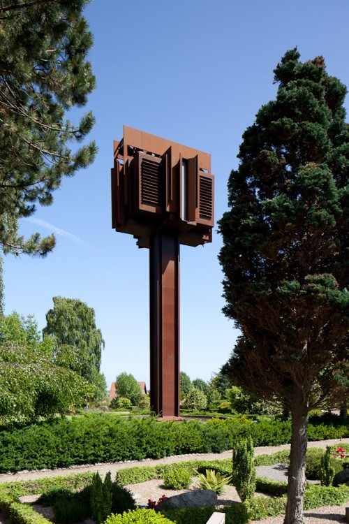 Klokketårnet ved Hadsund Kirke.